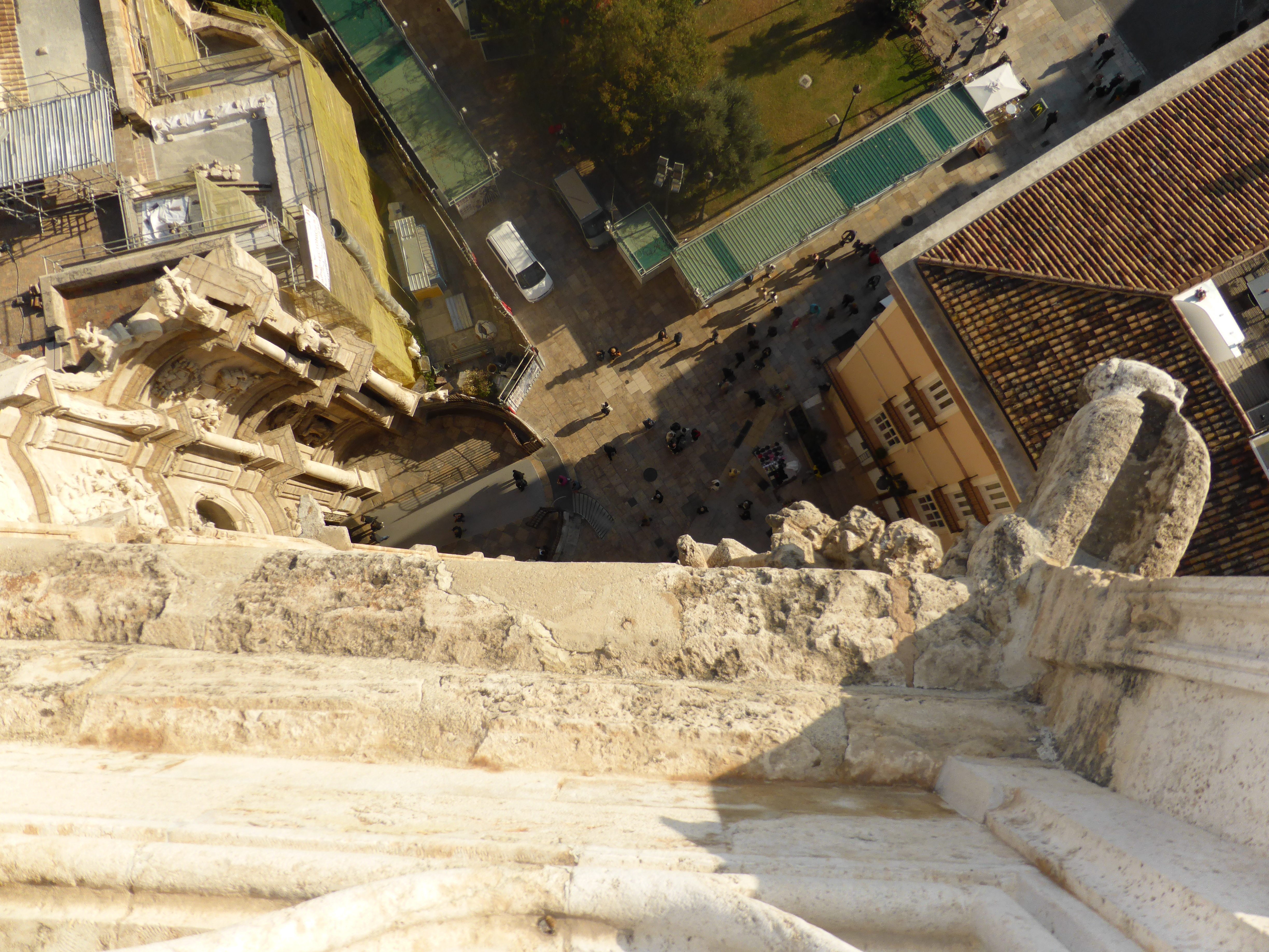 Desde lo alto de la torre del Miguelete, o Micalet, de la catedral de Valencia. Vista en picado, en vertical hacia abajo, viéndose parte de la fachada barroca de la puerta de los Hierros. Aunque cientos de personas suben todos los días a la torre, esta fotografía presenta un encuadre muy original. Fue realizada suspendiendo la cámara, fuera del pretil.